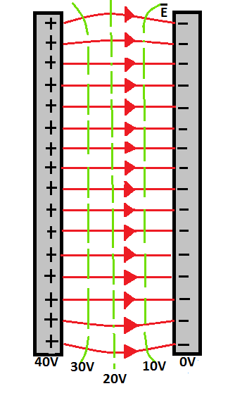 Representación de las lineas del campo y equipotenciales en un condensador